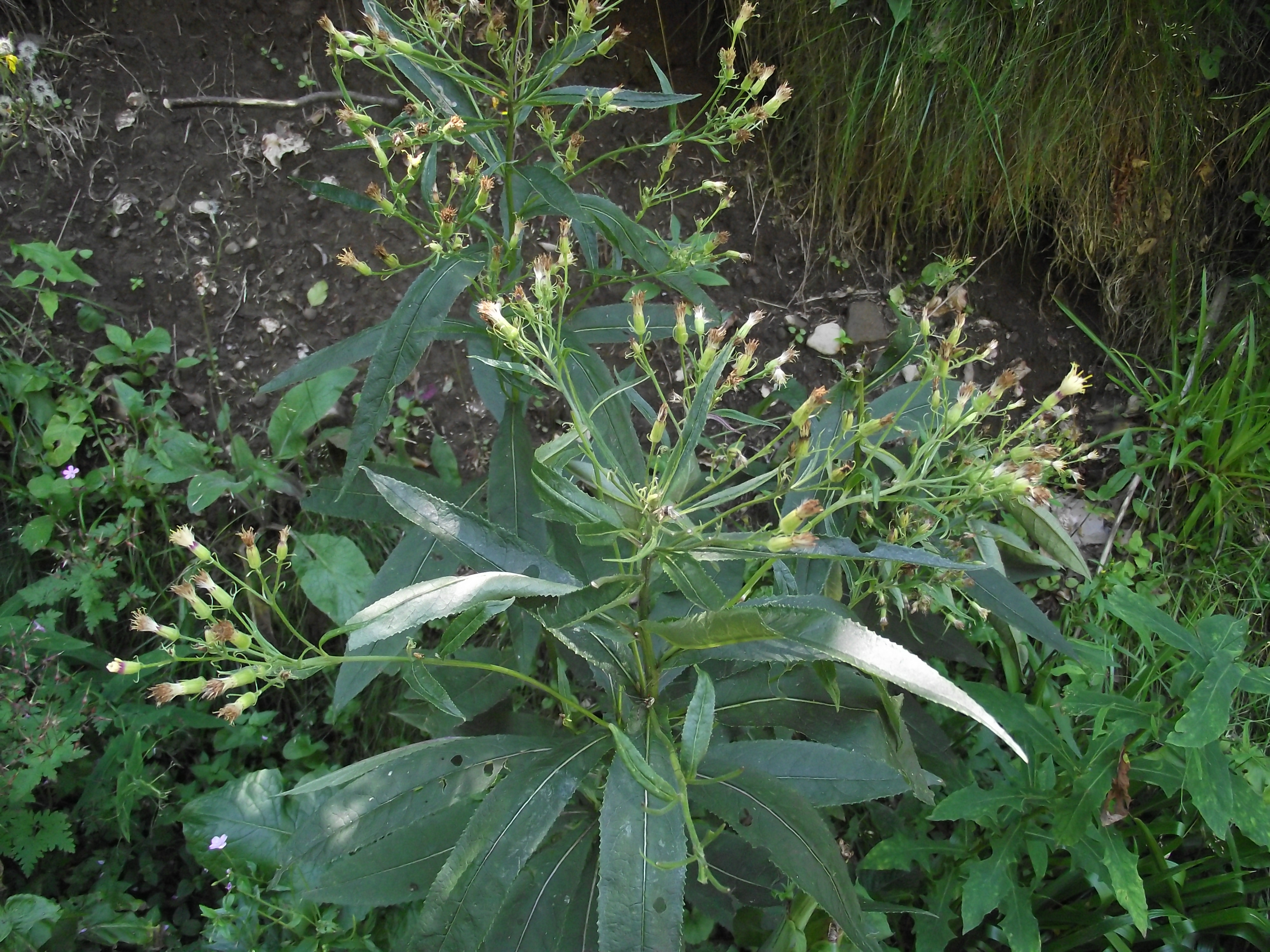 Seneçon cacaliaster dans les monts d'Auvergne (France)